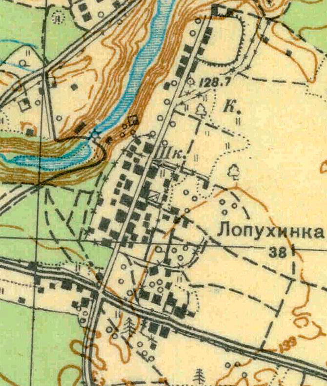 Топографическая карта Ленинградской области, квадрат О-35-11-Г-г (Муховицы), деревня Лопухинка.